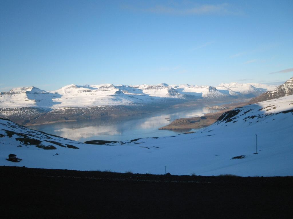 Fjarðaál en Reyðarfjörður, Islandia